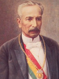 Mariano Baptista Caserta (1832-1907) presidente de la República de Bolivia entre 1892 - 1896.